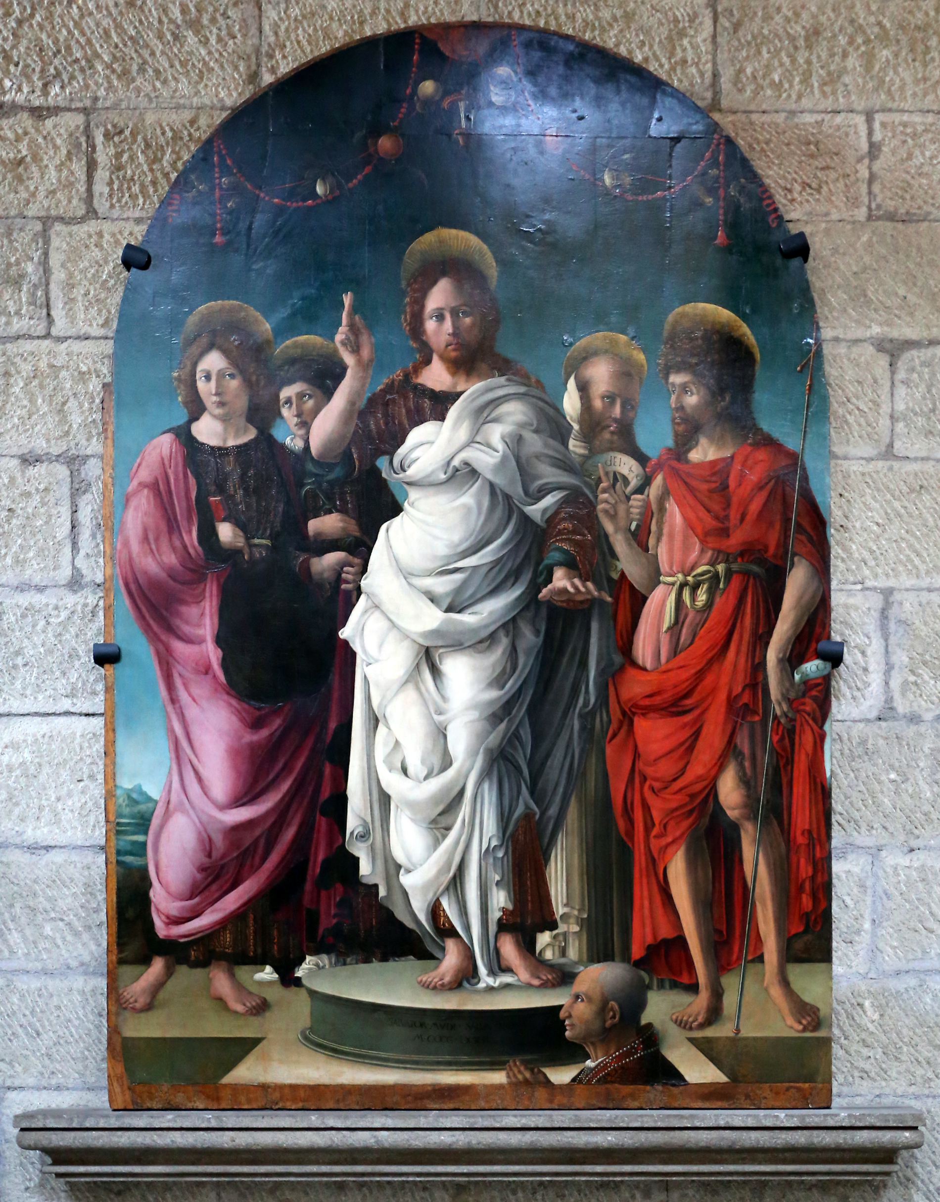 Resurrected Christ and Four Saints (Viterbo) This is a photo of a monument which is part of cultural heritage of Italy.